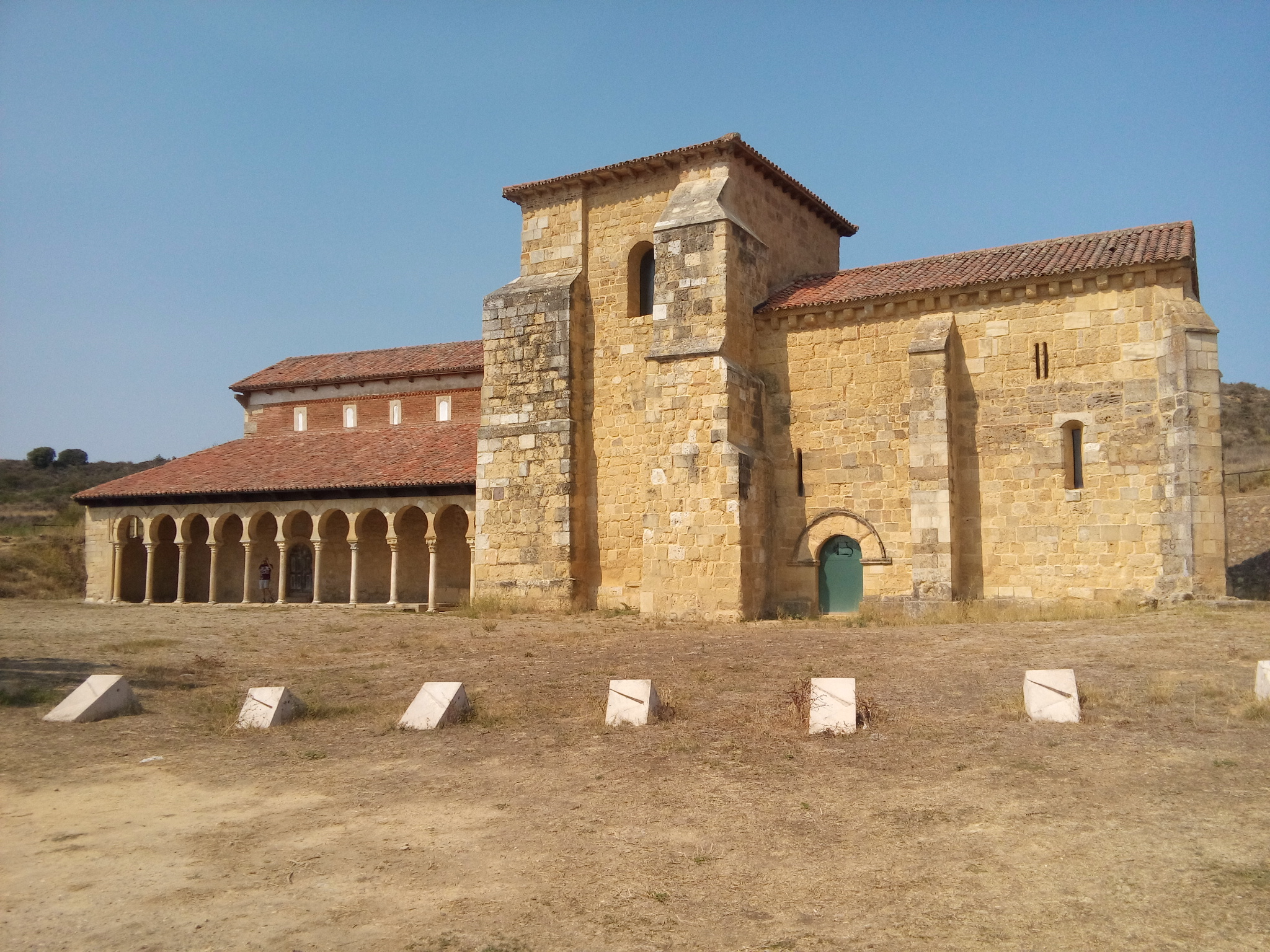 Fachada de San Miguel de Escalada